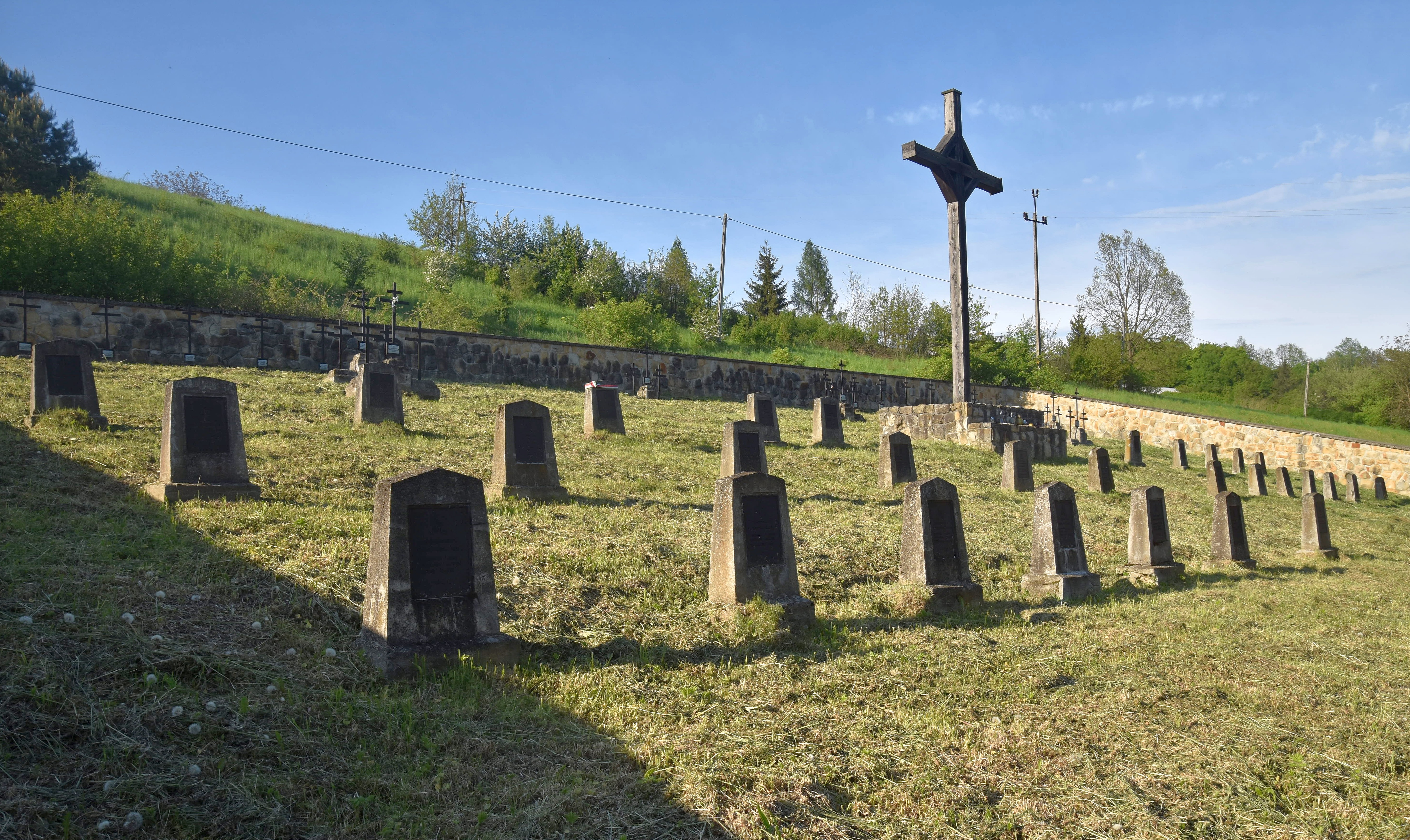 Ostrusza, Cmentarz wojenny nr 143 - Ostrusza